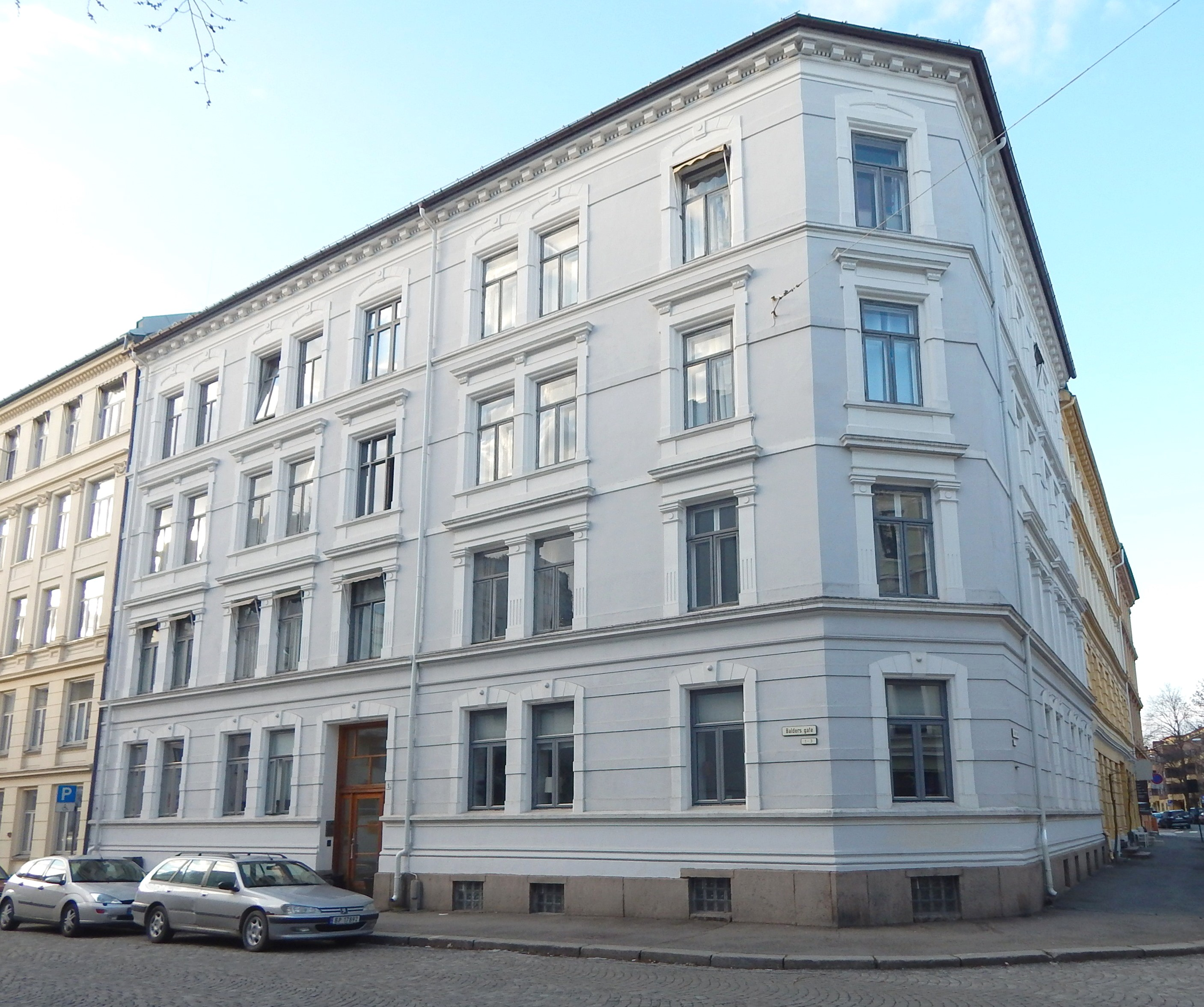 Balders gate 3